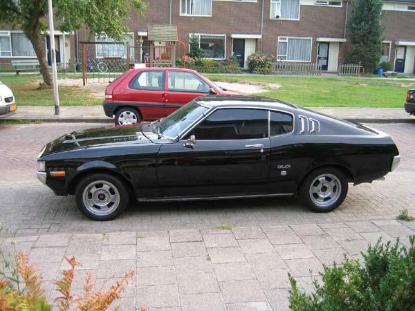 Toyota Celica RA28